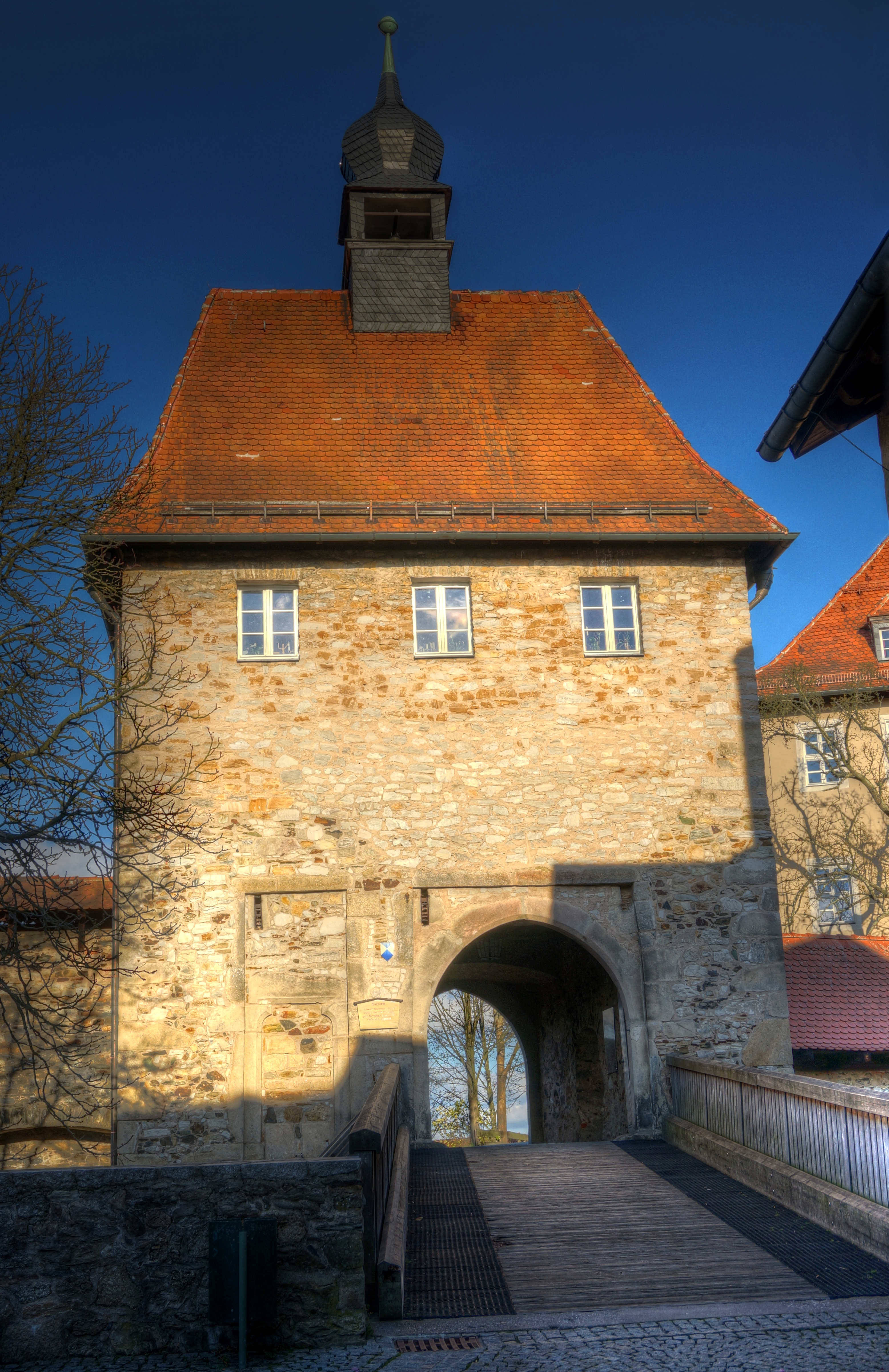 Deutschland, Bayern, Oberfranken, Landkreis Wunsiedl, Ort: Hohenberg an der Eger, Burg Hohenberg, Außenansicht des Eingangstors mit Brücke